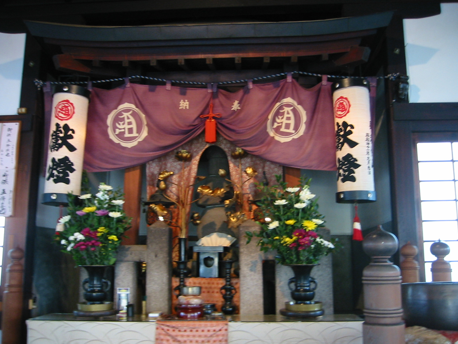 神戸 那須与一の墓 那須与市墓所碧雲寺宗照院隣のお堂にて nasuyoichi tomb